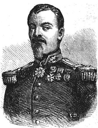 Le général Beuret.